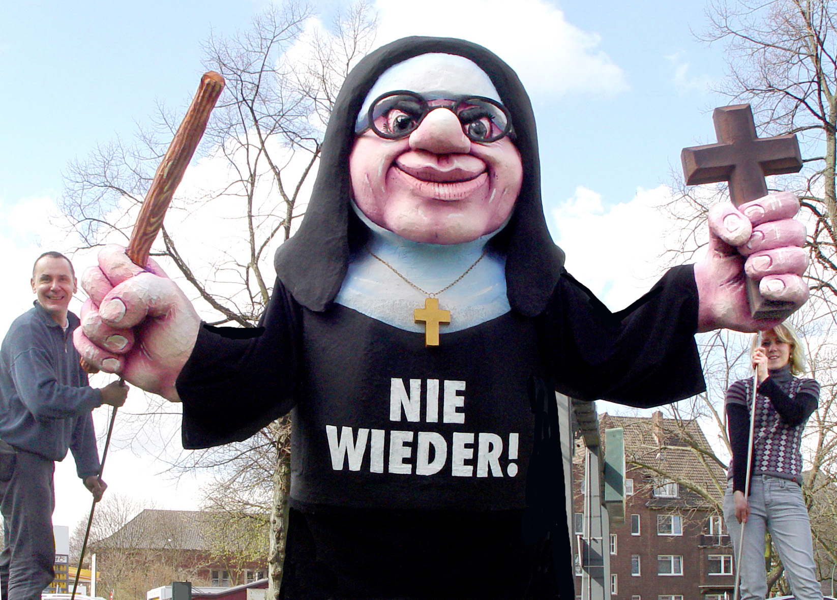 Mobile Skulptur einer prügelnden Nonne für eine Demonstration der ehemaligen Heimkinder am 15. April 2010 in Berlin.